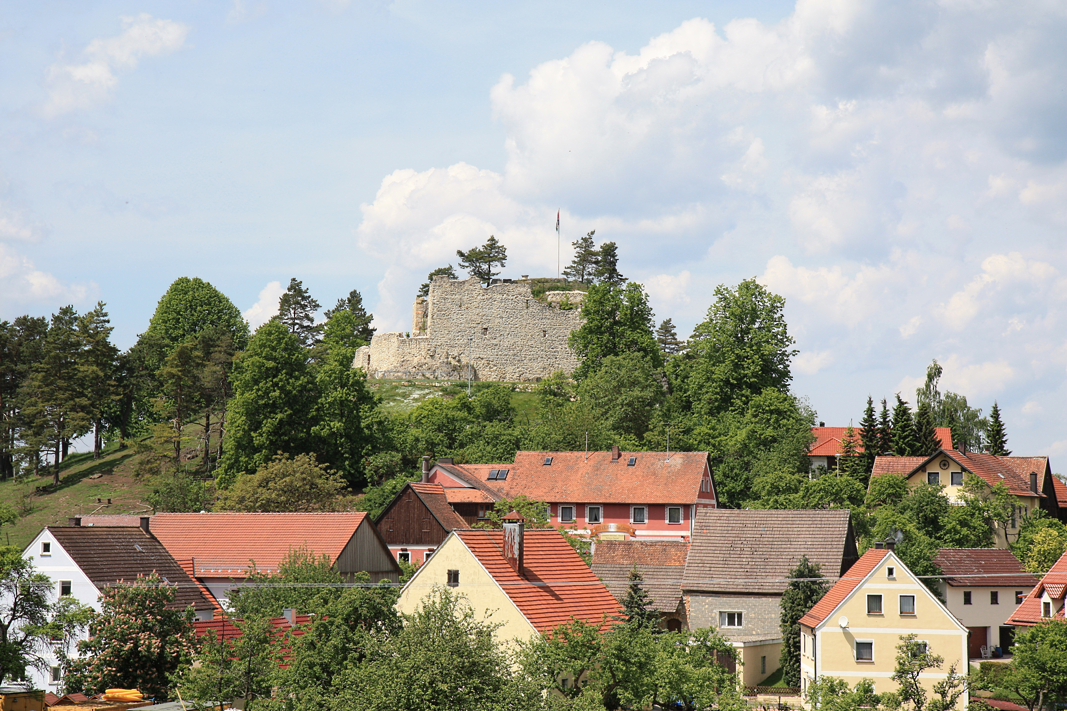 Ansicht der Burgruine Lichtenegg von Südosten